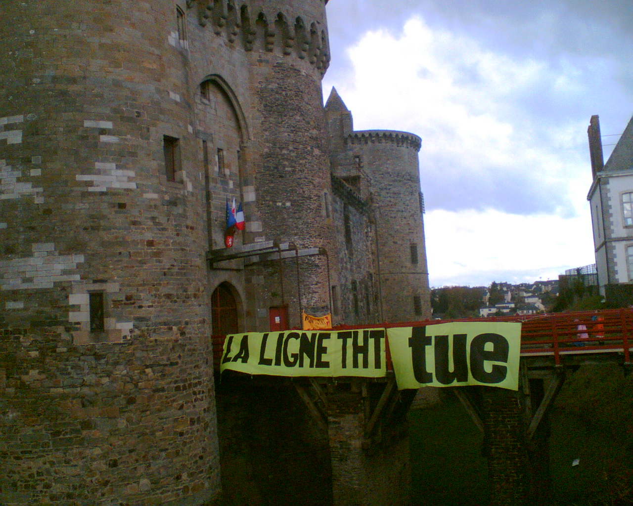 Banderole contre la ligne très haute tension (THT) Normandie–Maine sur le pont-levis du château de Vitré